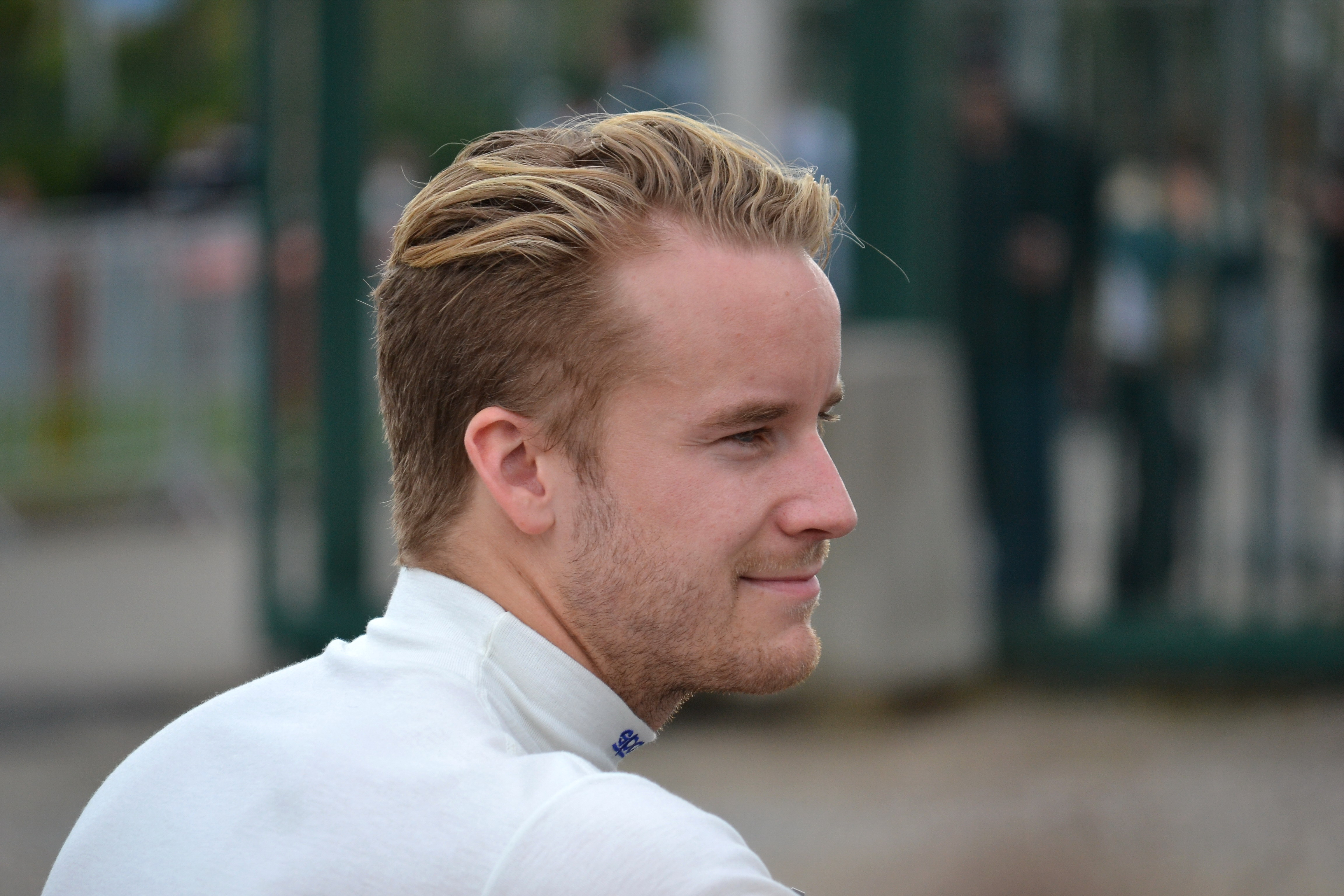 Mads Østberg au parc d'assistance de Colmar durant le Rallye de France-Alsace 2013.